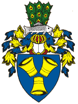 Znak obce Ivančice